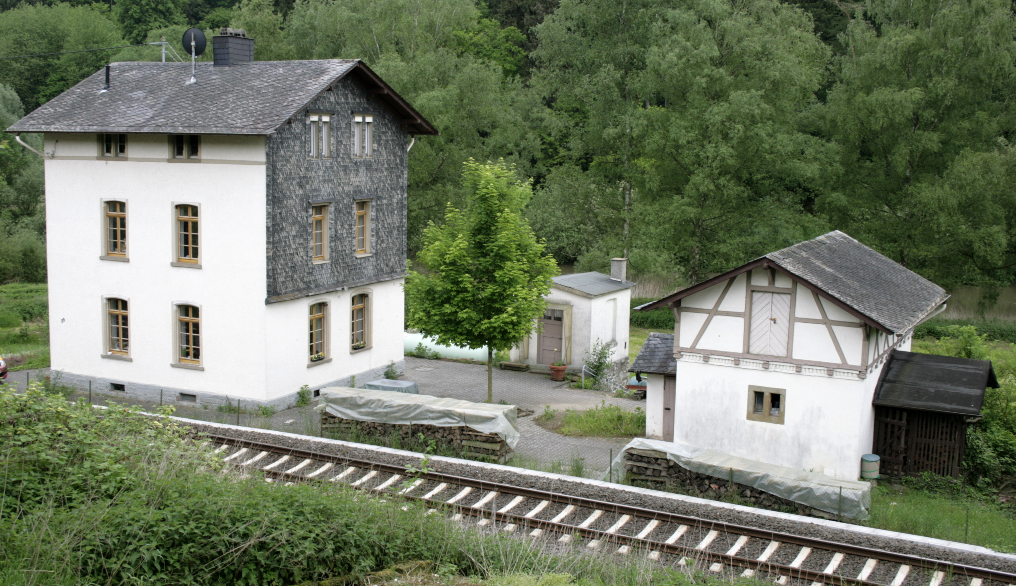 Ehemaliger Bahnhof Arfurt